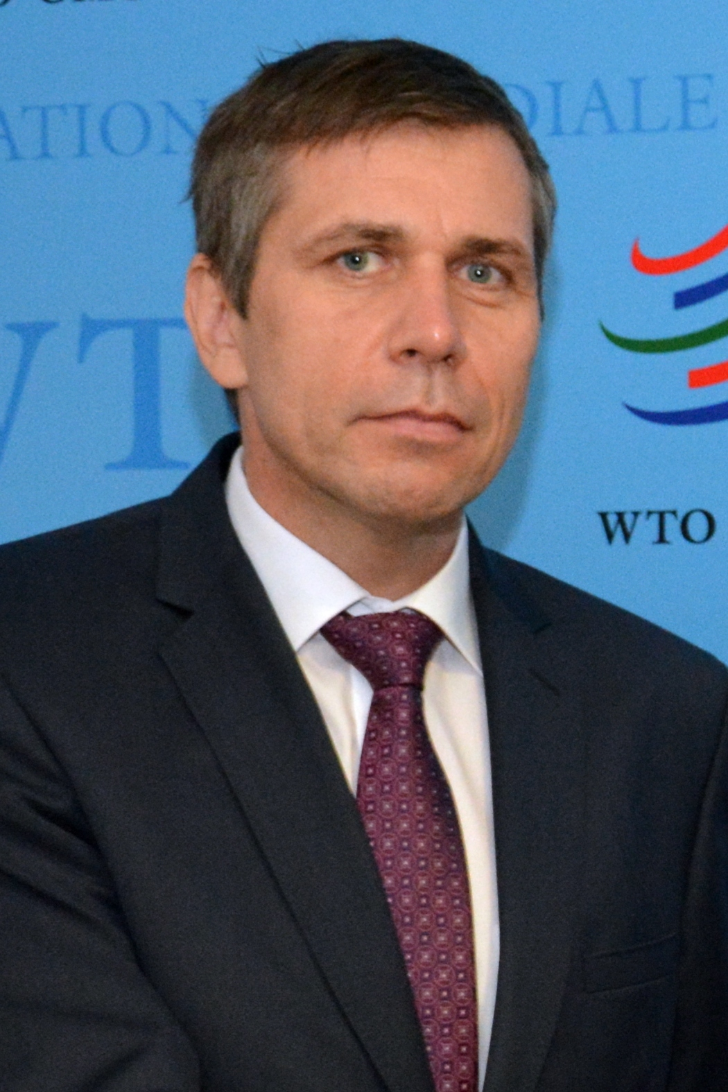 Andre Pung